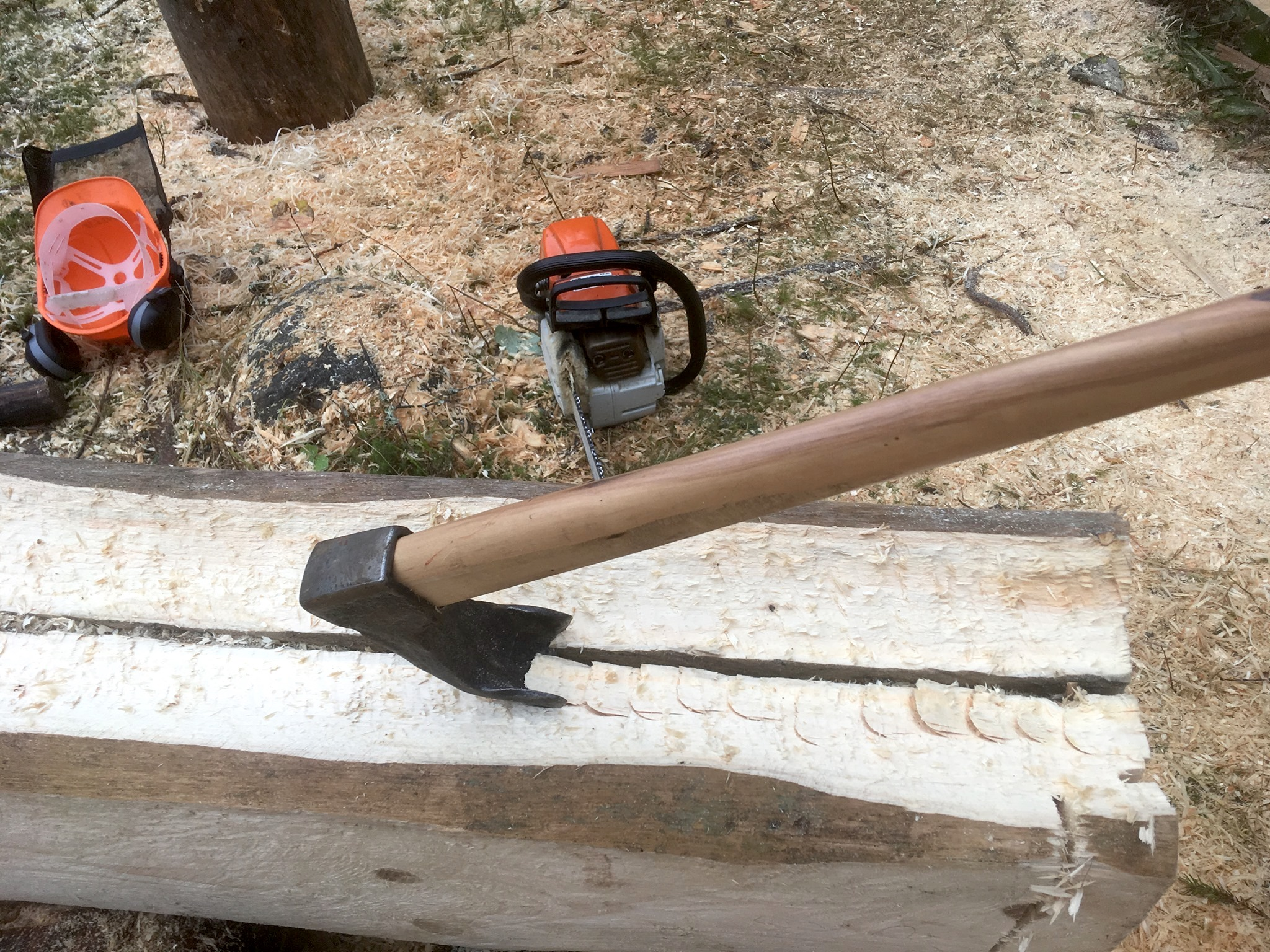 Traditsiooniliselt on palki varatud künakirvega